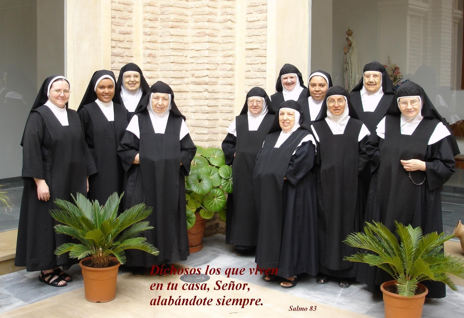 Monjas Agustinas Descalzas